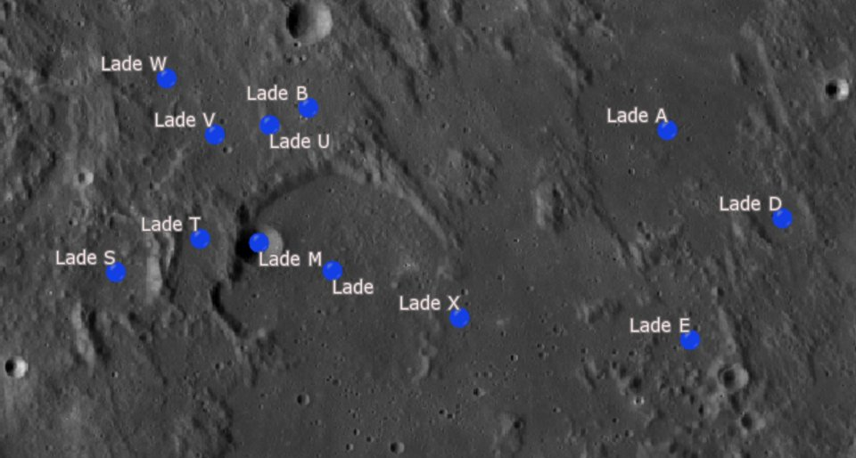 Cráter lunar Lade. Cráteres satélite. (Imagen LRO)